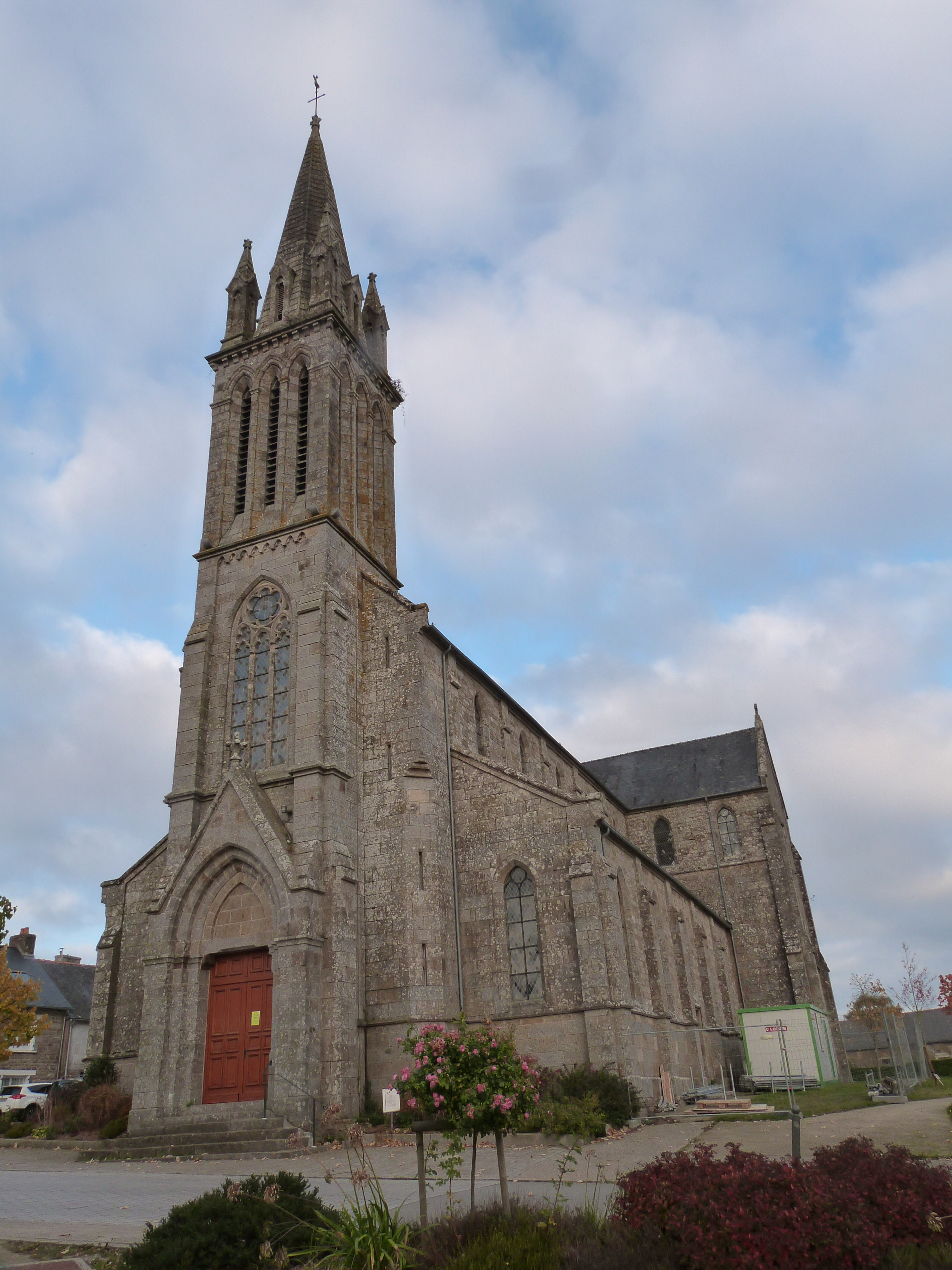 Eglise Saint-Ronan à Laurenan